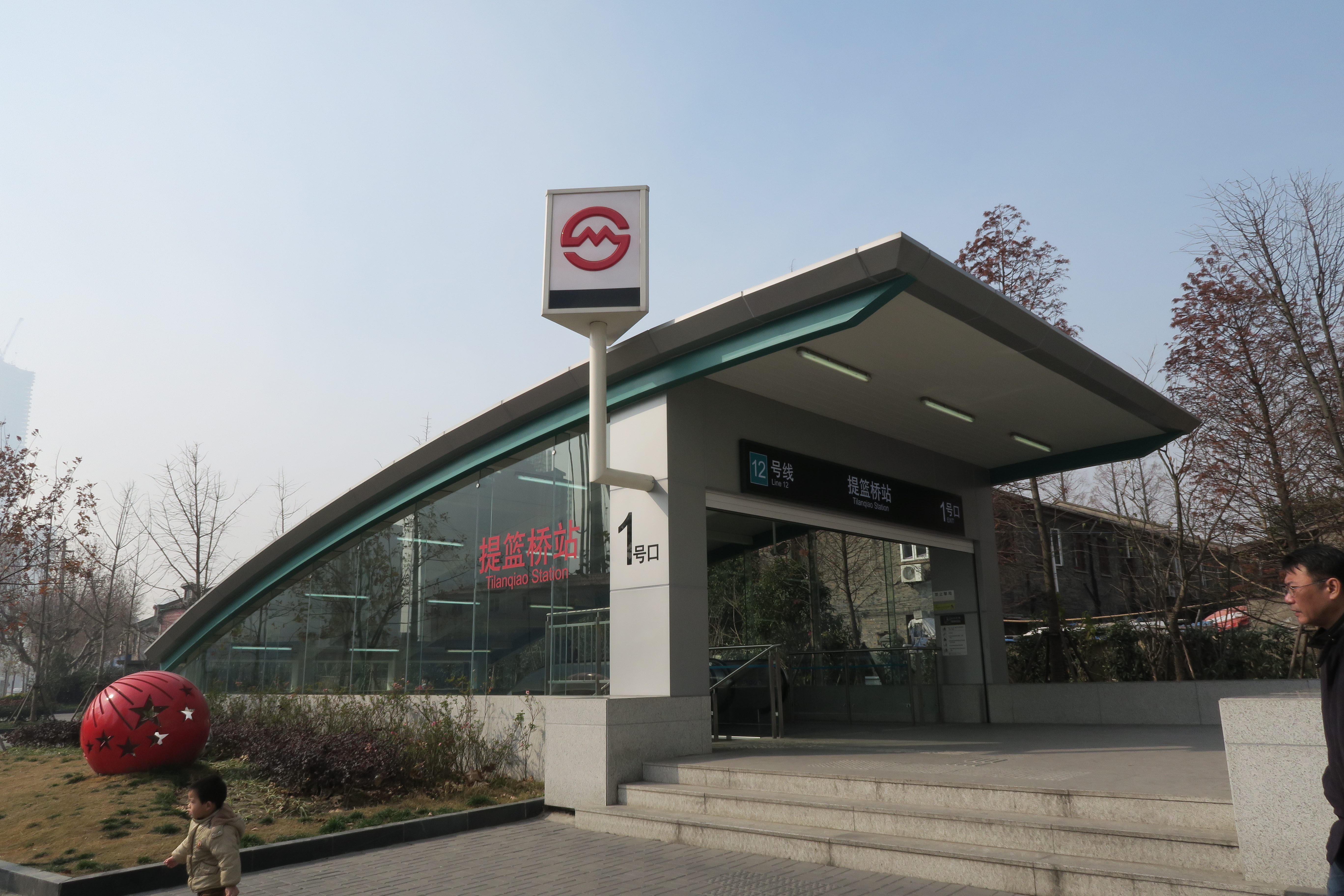 12号线提篮桥站